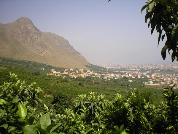 Scorcio della borgata di Ciaculli sovrastata dal monte Grifone.